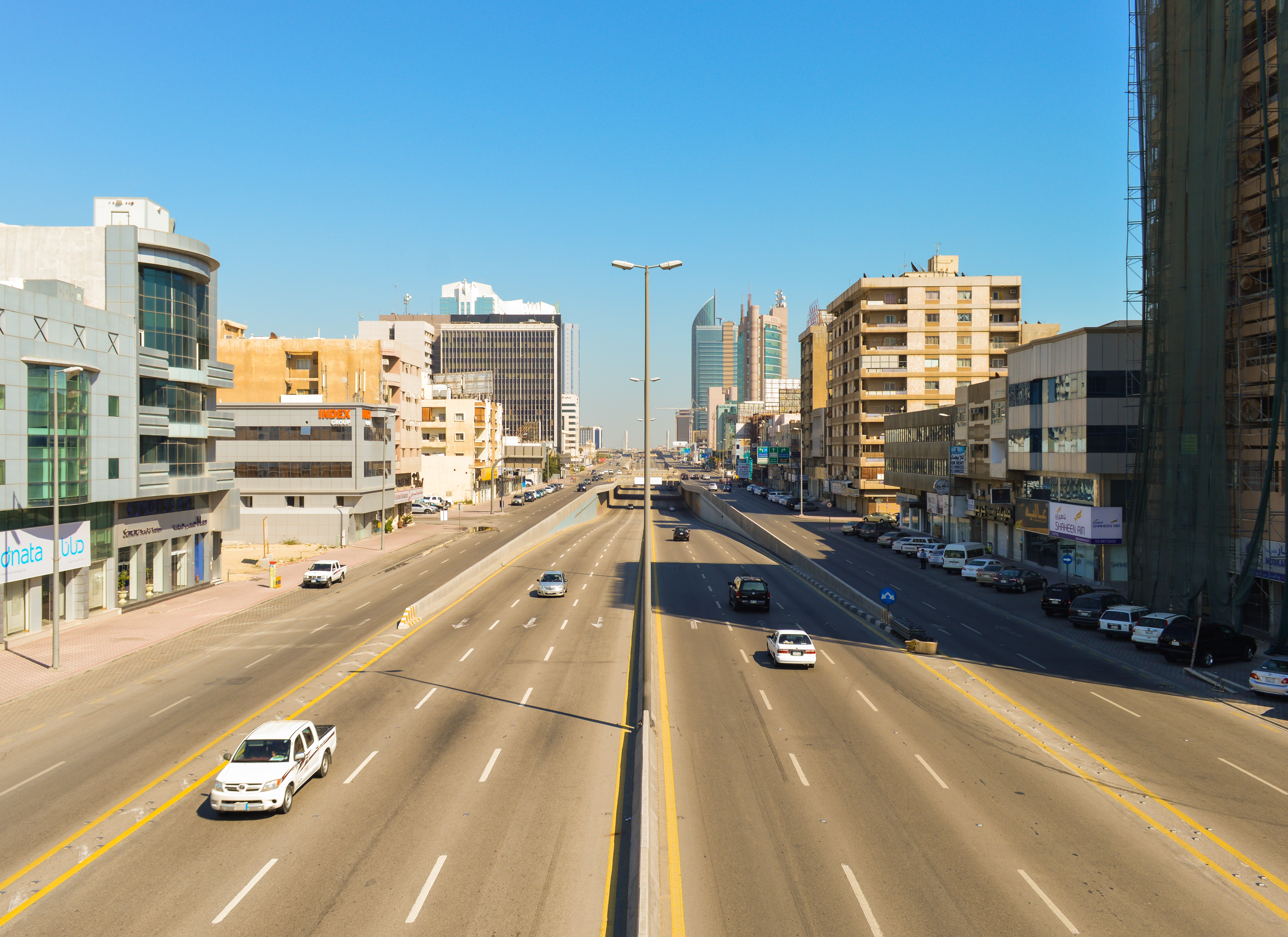 King Fahd road in Al Bandareyah, Al Khubar, Ash Sharqiyah , ksa